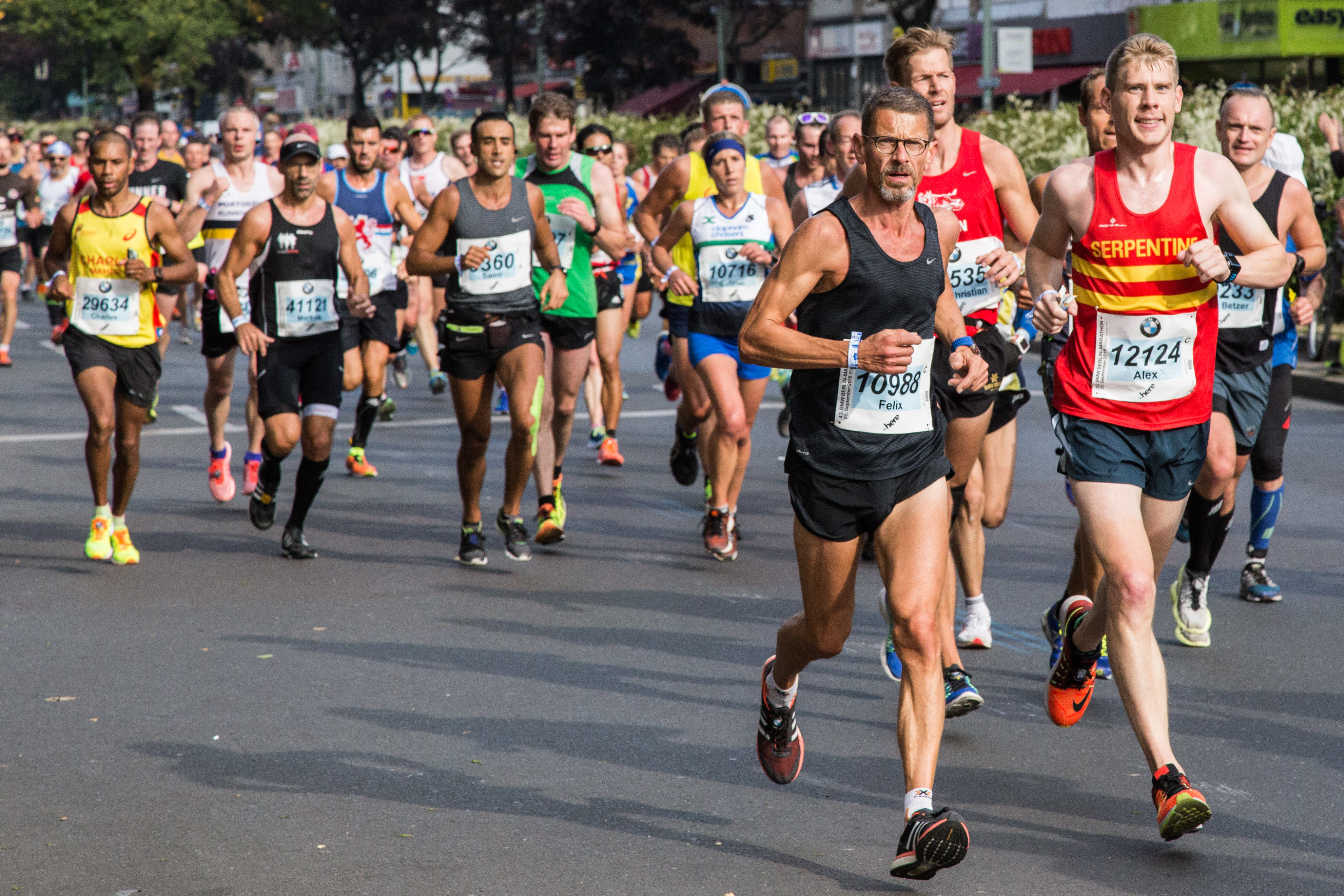 Läufer beim Berlin Marathon 2016